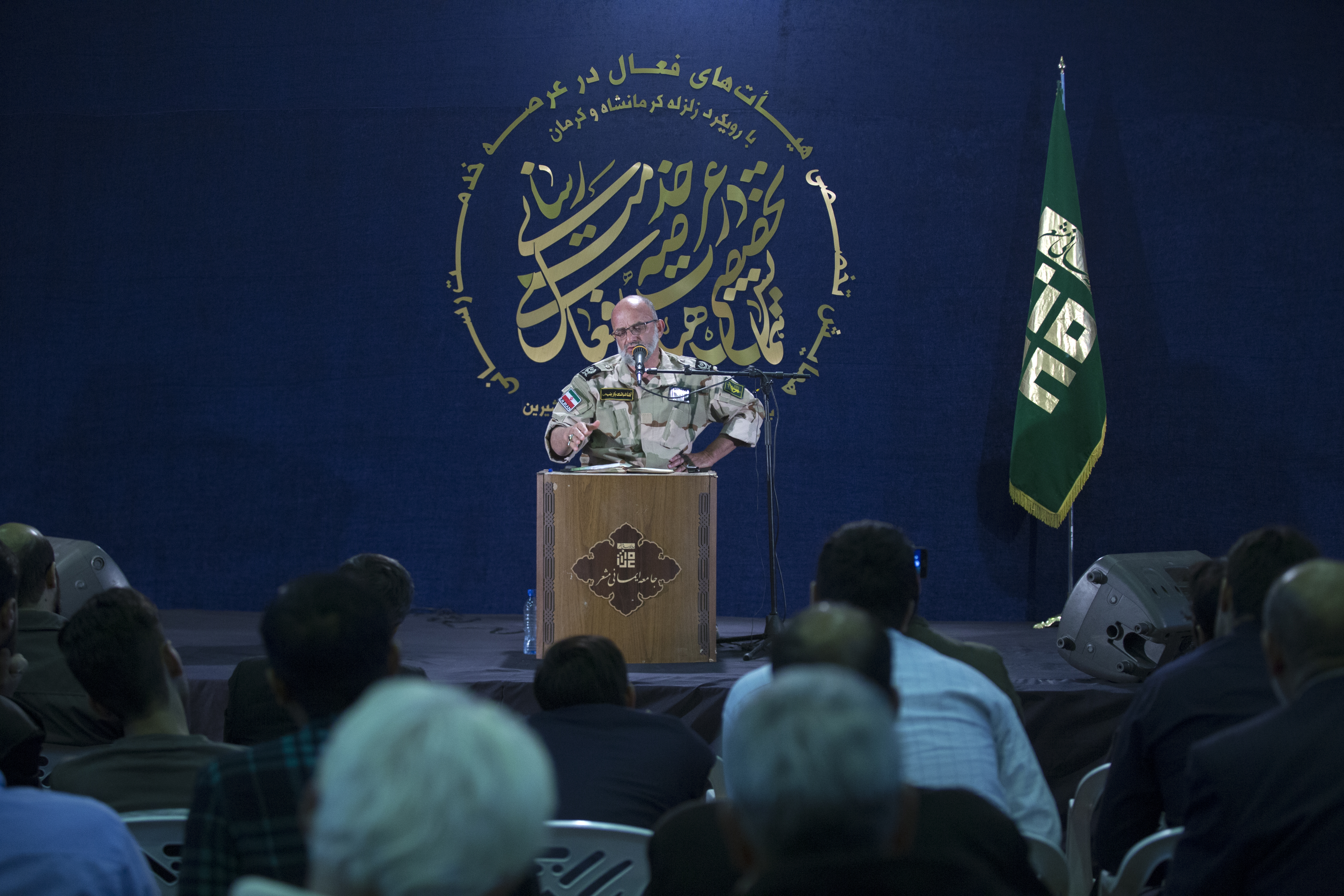 سعید قاسمی فعال فرهنگی سیاسی ایرانی و از فرماندهان جنگ ایران و عراق است. او دارای مدرک کارشناسی ارشد معماری از دانشگاه علم و صنعت ایران است و در دانشگاه شهید رجایی معماری تدریس می‌کند. او بارها از محمود احمدی‌نژاد حمایت کرده است. عکس ها مربوط به سخنرانی جدید سعید محمد قاسمی در همایش تخصصی هیأت های مذهبی در قصر شیرین کرمانشاه با رویکرد زلزله کرمانشاه و کرمان. عکس: مصطفی معراجی